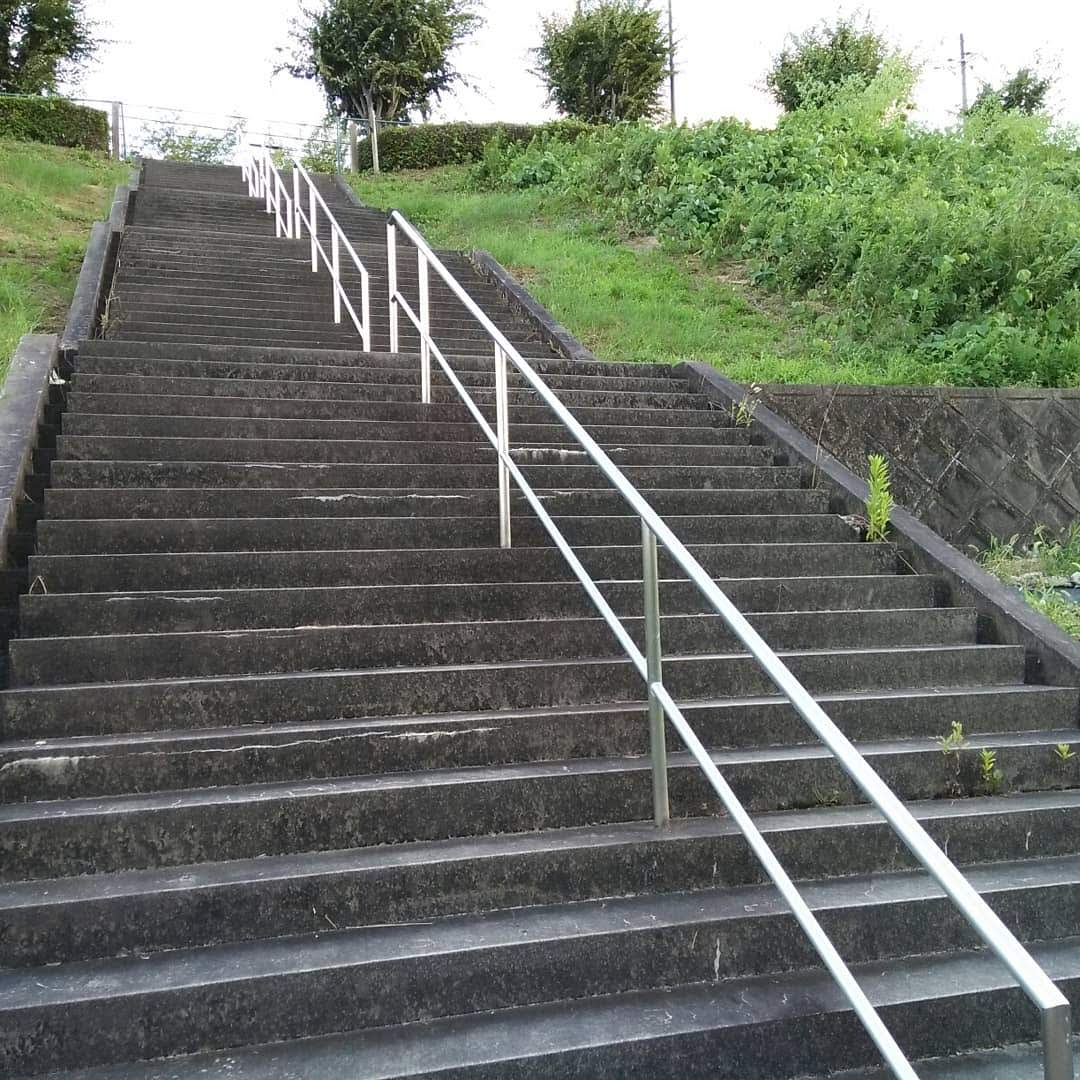 Tangga di Jepang